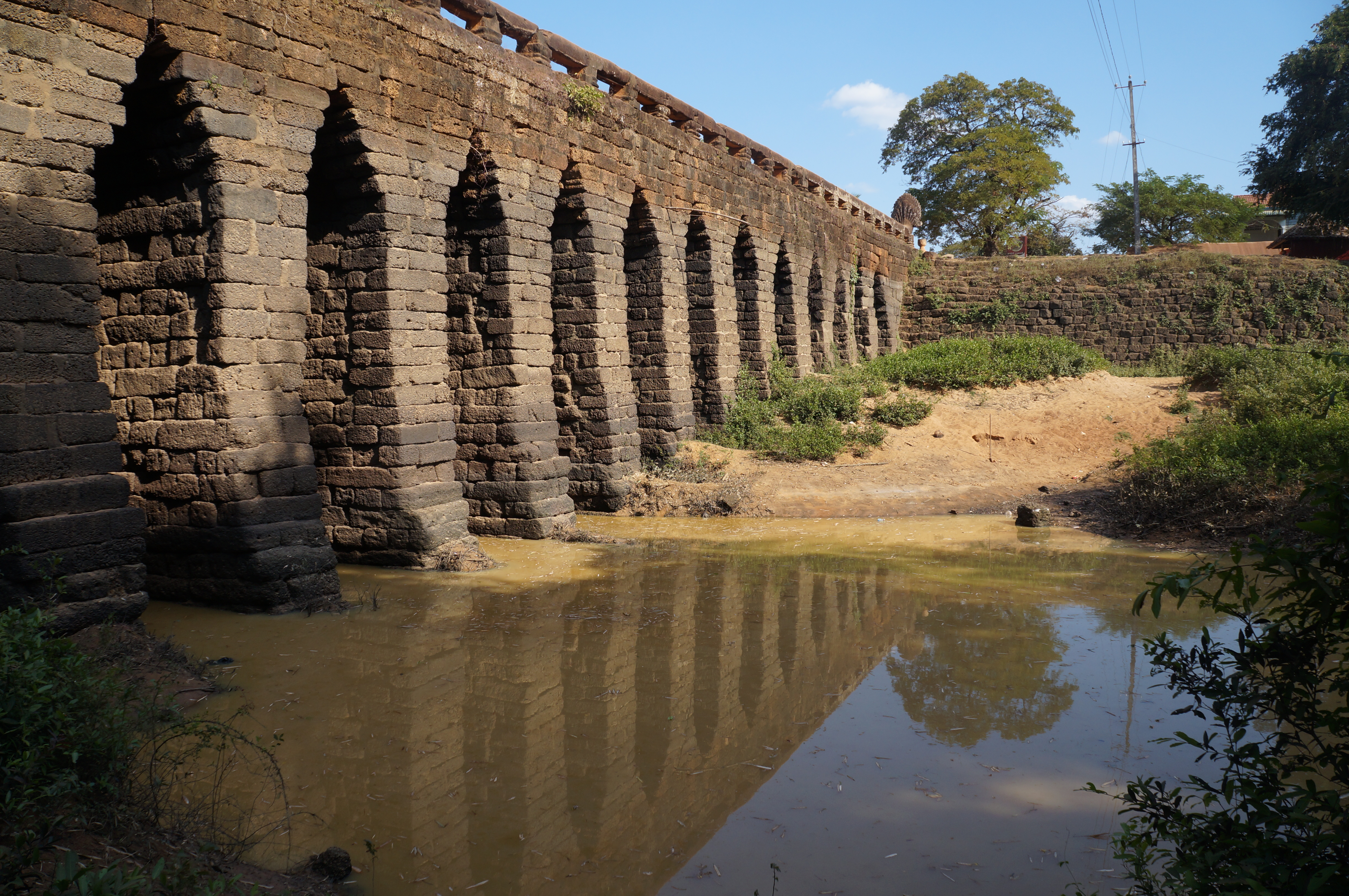 le pont de Kompong Kdei (12e siècle) Spean Praptos sur la route 'Angkor Thom, au Cambodge